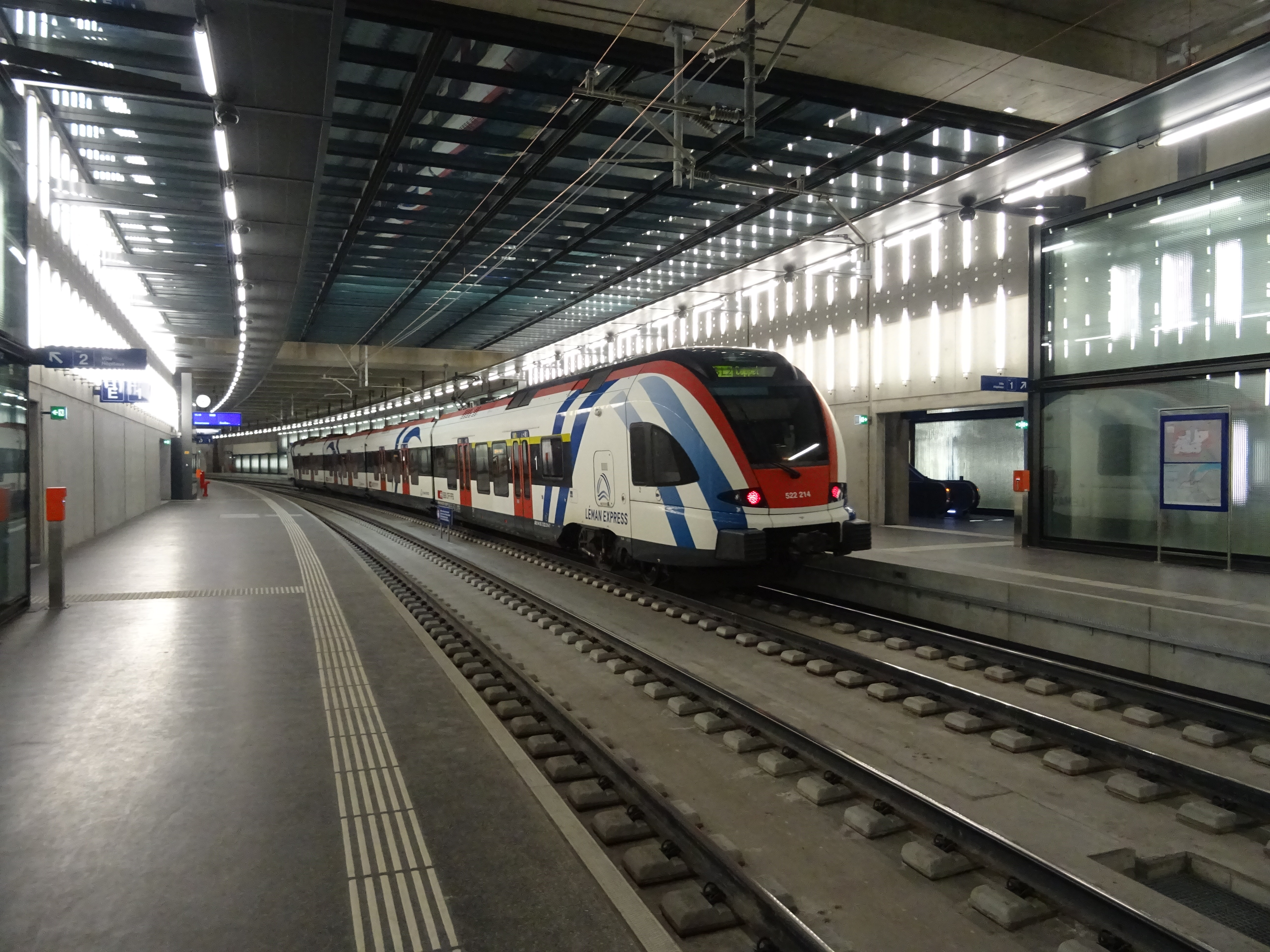 FLIRT Léman Express à quai à Genève-Champel et assurant un service SL 2 en direction de Coppet.